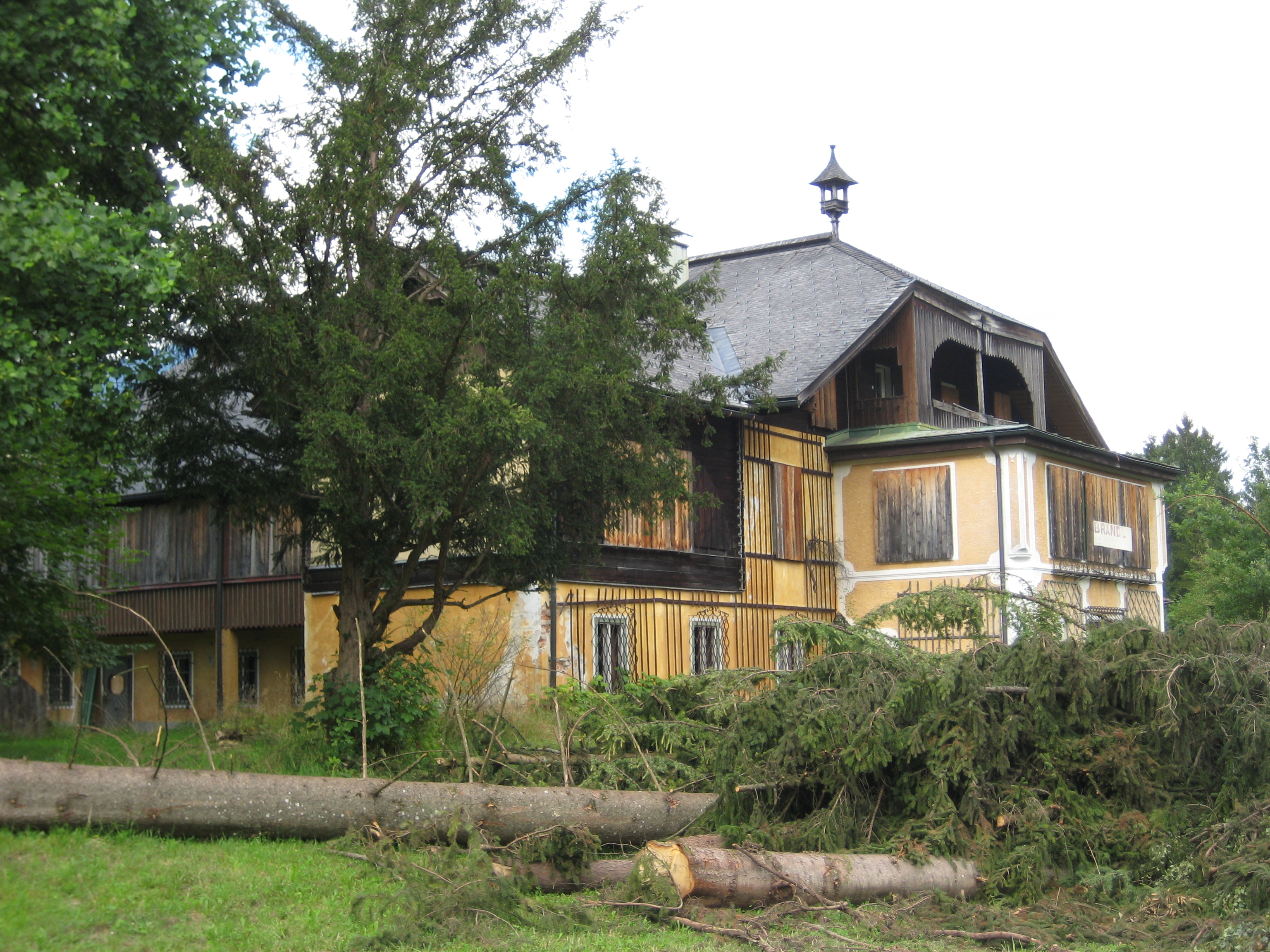 Haidenhof, ehem. Gottwaldgütl